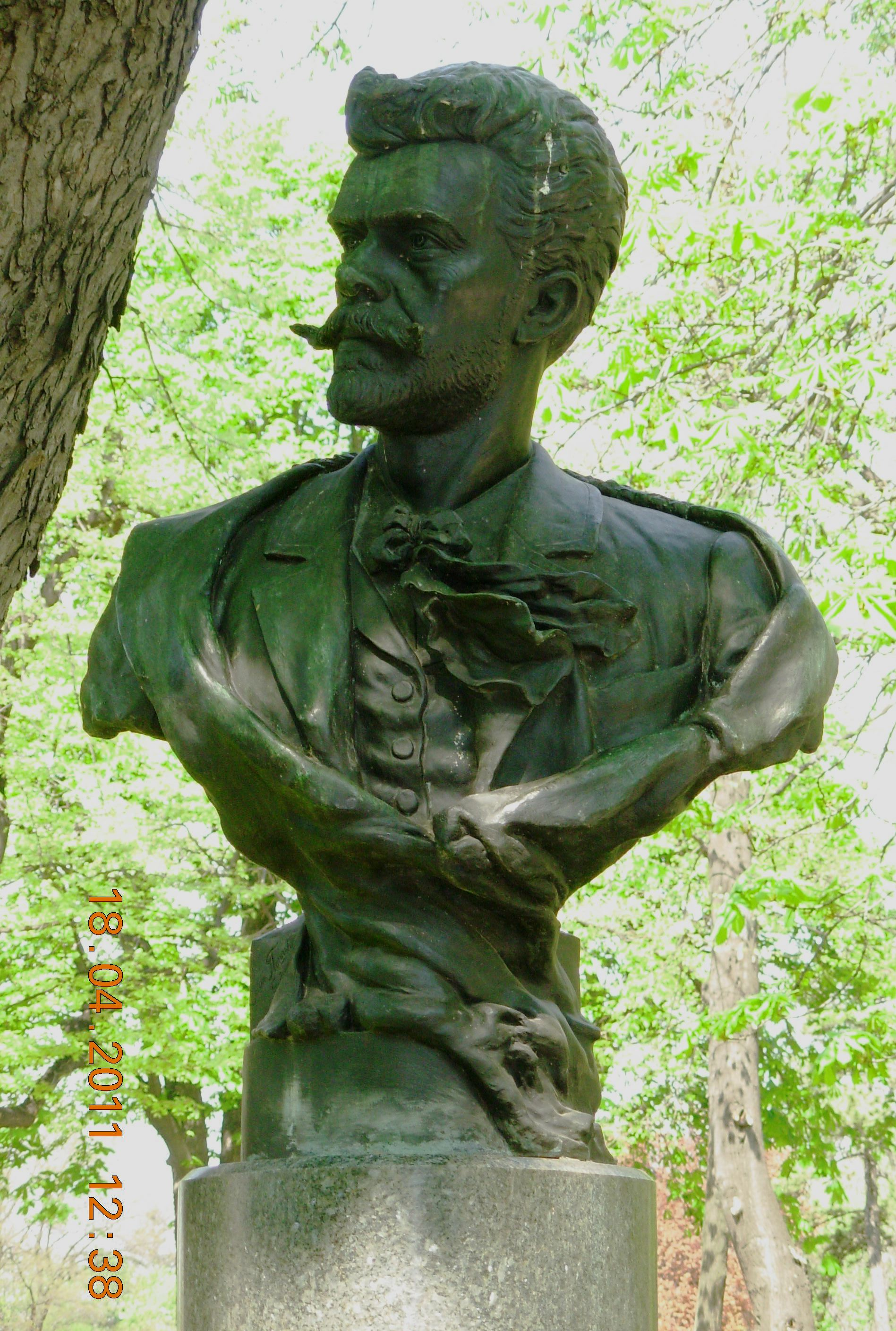 Војислав Илић на Калимегдану, Београд. Сликао Голдфингер